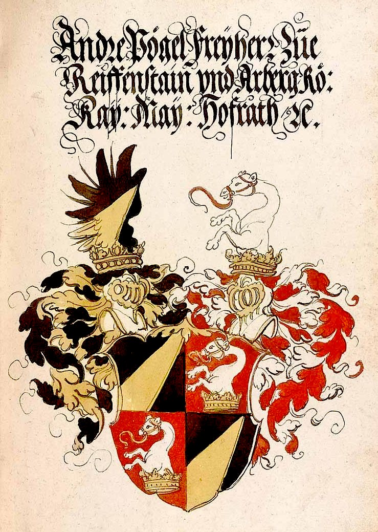 Wappen „Andre Pögel Freyherr zue Reiffenstain“ (Andreas Pögl, Freiherr von Reifenstein) aus einem unbekanntem Wappenbuch